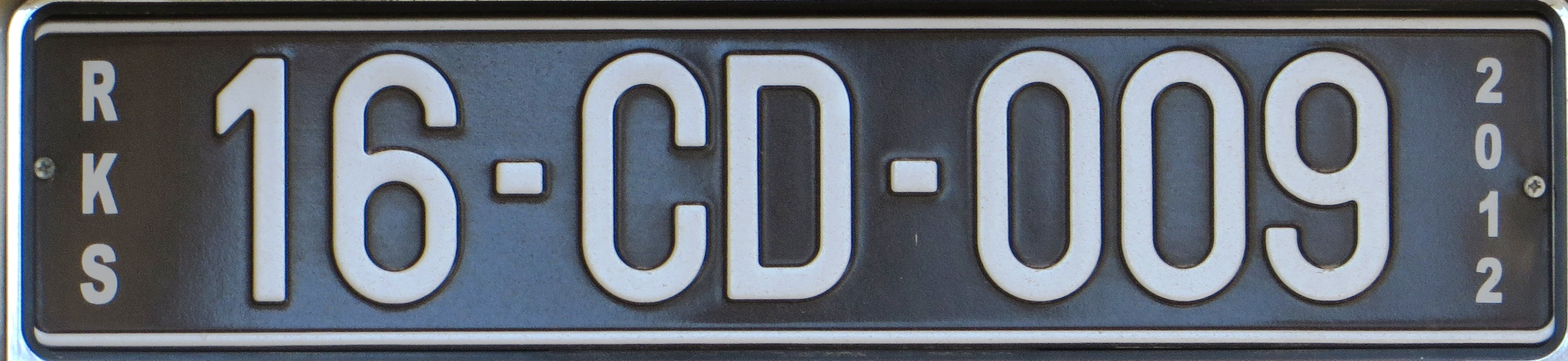 Kosovo CD kentekenplaat